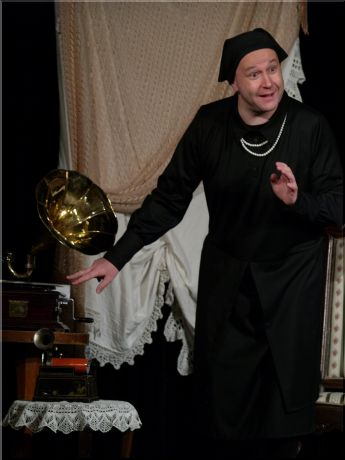 Libor Ulovec jako Charlotte von Mahlsdorf v divadelní hře Douga Weighta "Svou vlastní ženou" uváděné Divadlem SoLiTEAter, Praha